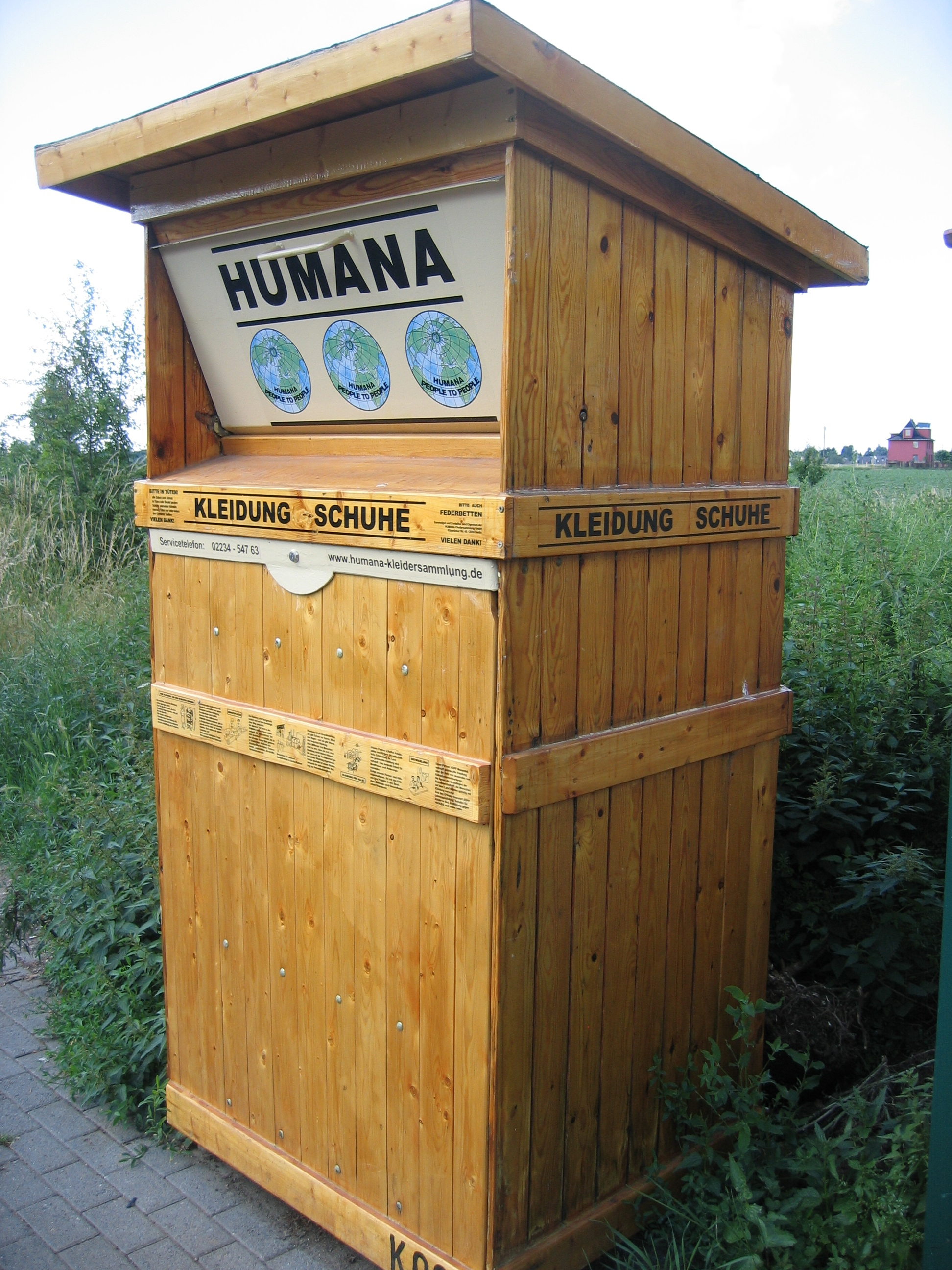 Ein Altkleinercontainer von Humana